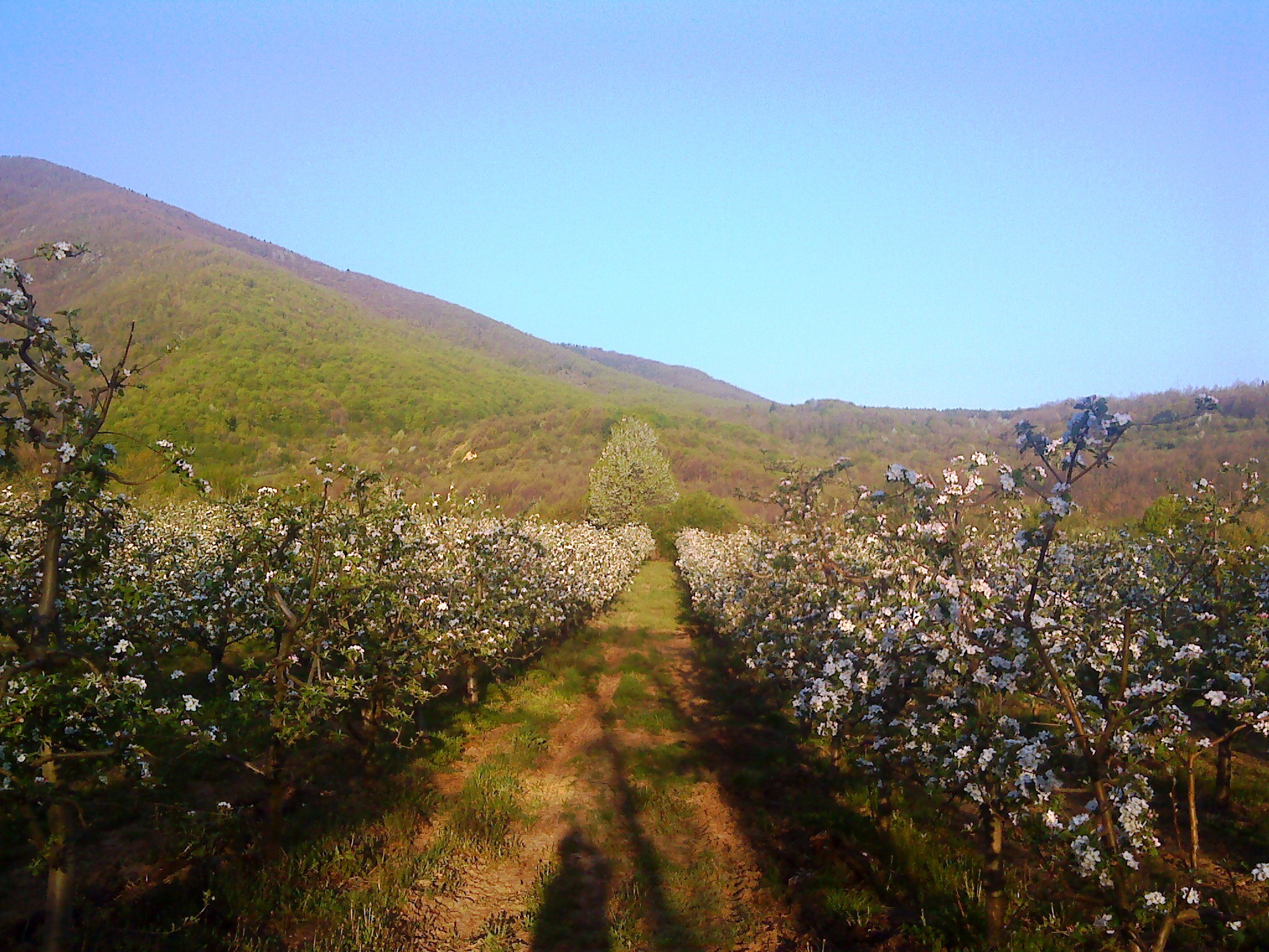 с.Кажани - Овоштарство